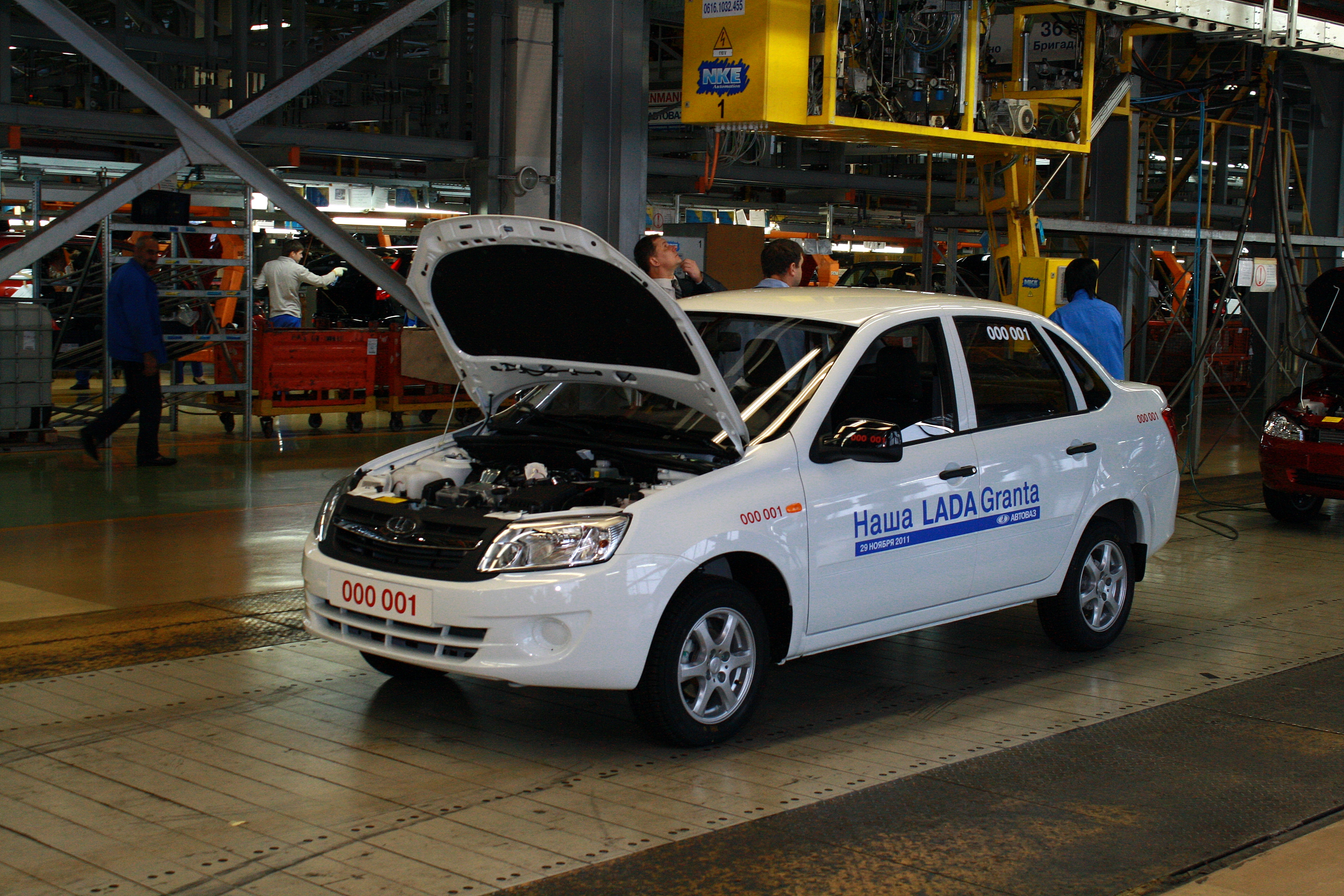 Первая серийная Lada Granta на конвейере АвтоВАЗа.